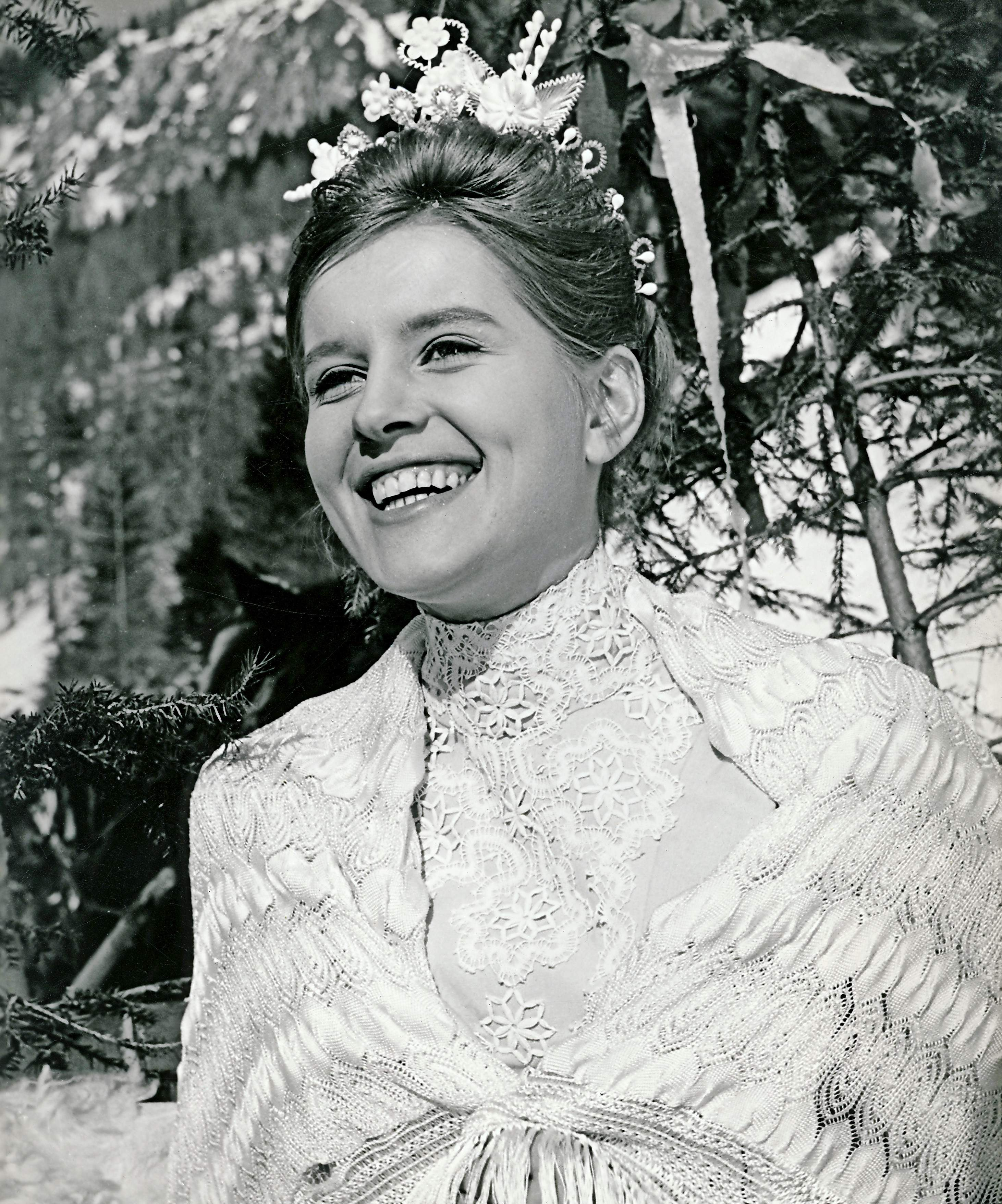 Alenka Vipotnik kot Lucija.